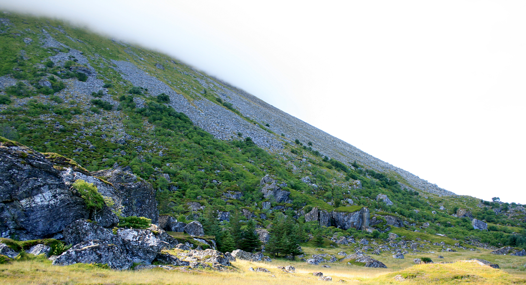 Lundeura, Lovunda, Lurøy, Nordland, Norway.